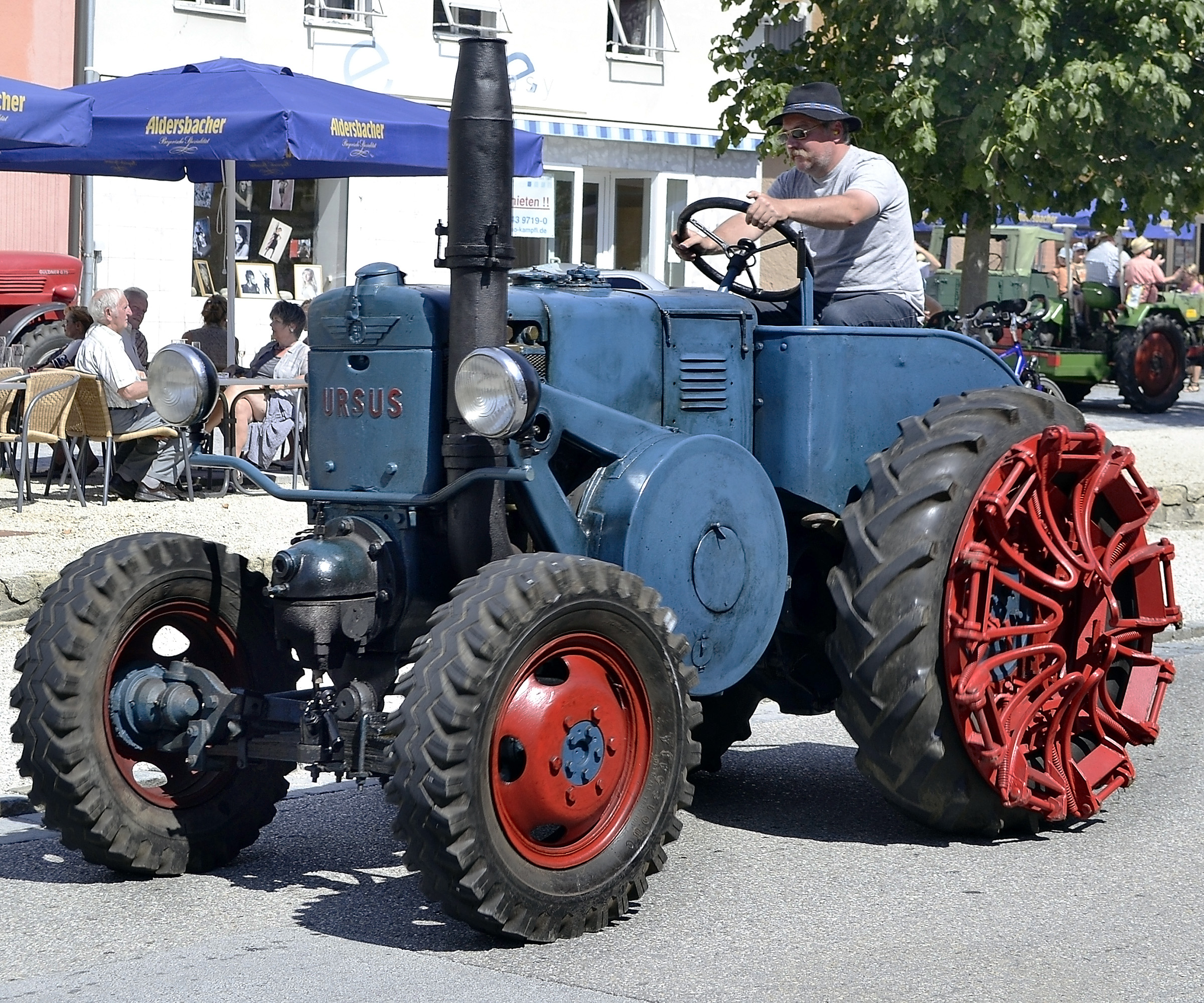 Ein Ursus-Traktor beim Oldtimerumzug in Aidenbach.